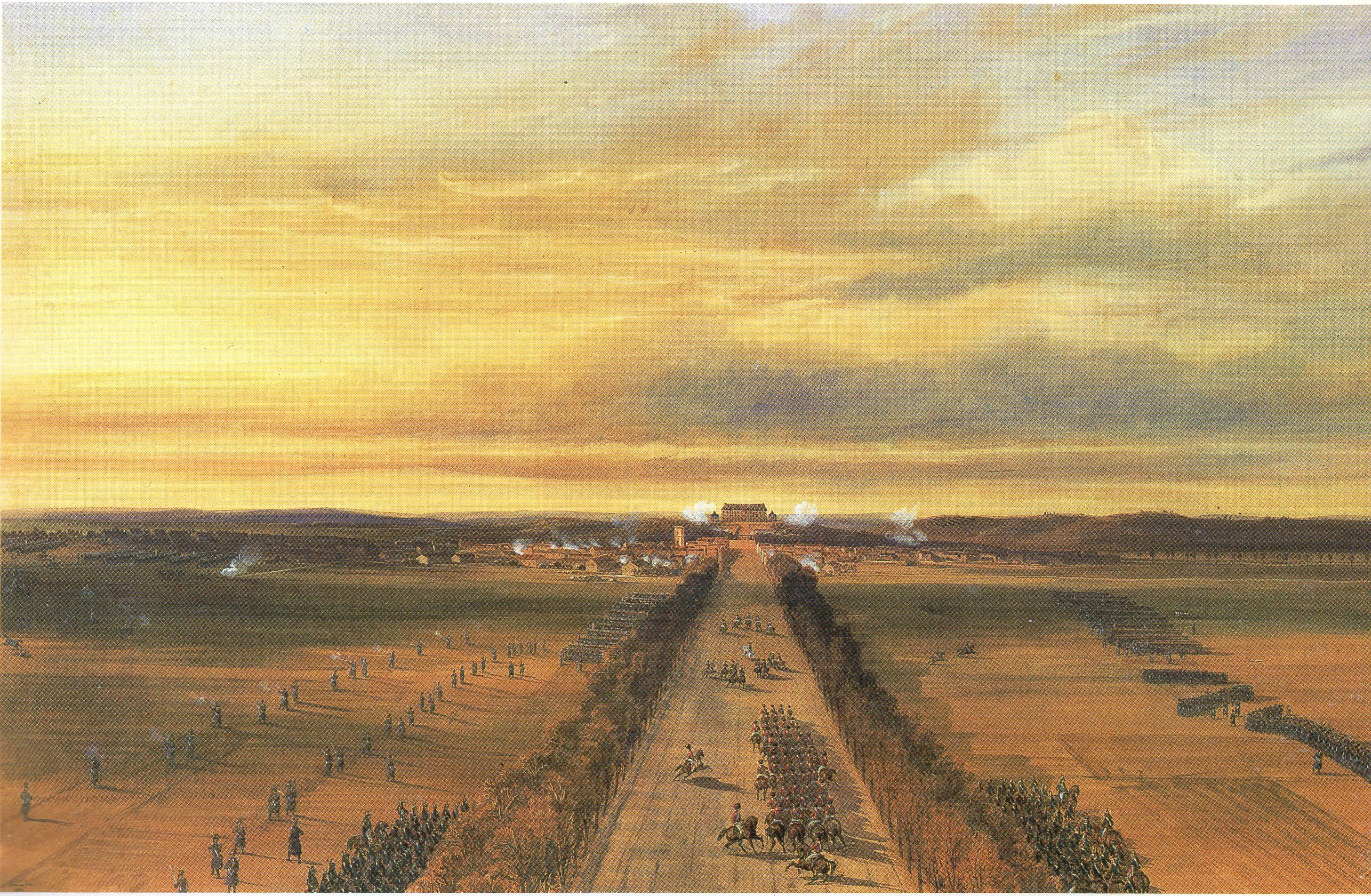 Bataille de Brienne (29 janvier 1814), par Jean Antoine Siméon Fort. Au centre, Napoléon Ier galope vers la ville escorté d'un peloton de chasseurs à cheval de la Garde impériale. A droite, l'infanterie du maréchal Victor marche vers Brienne.